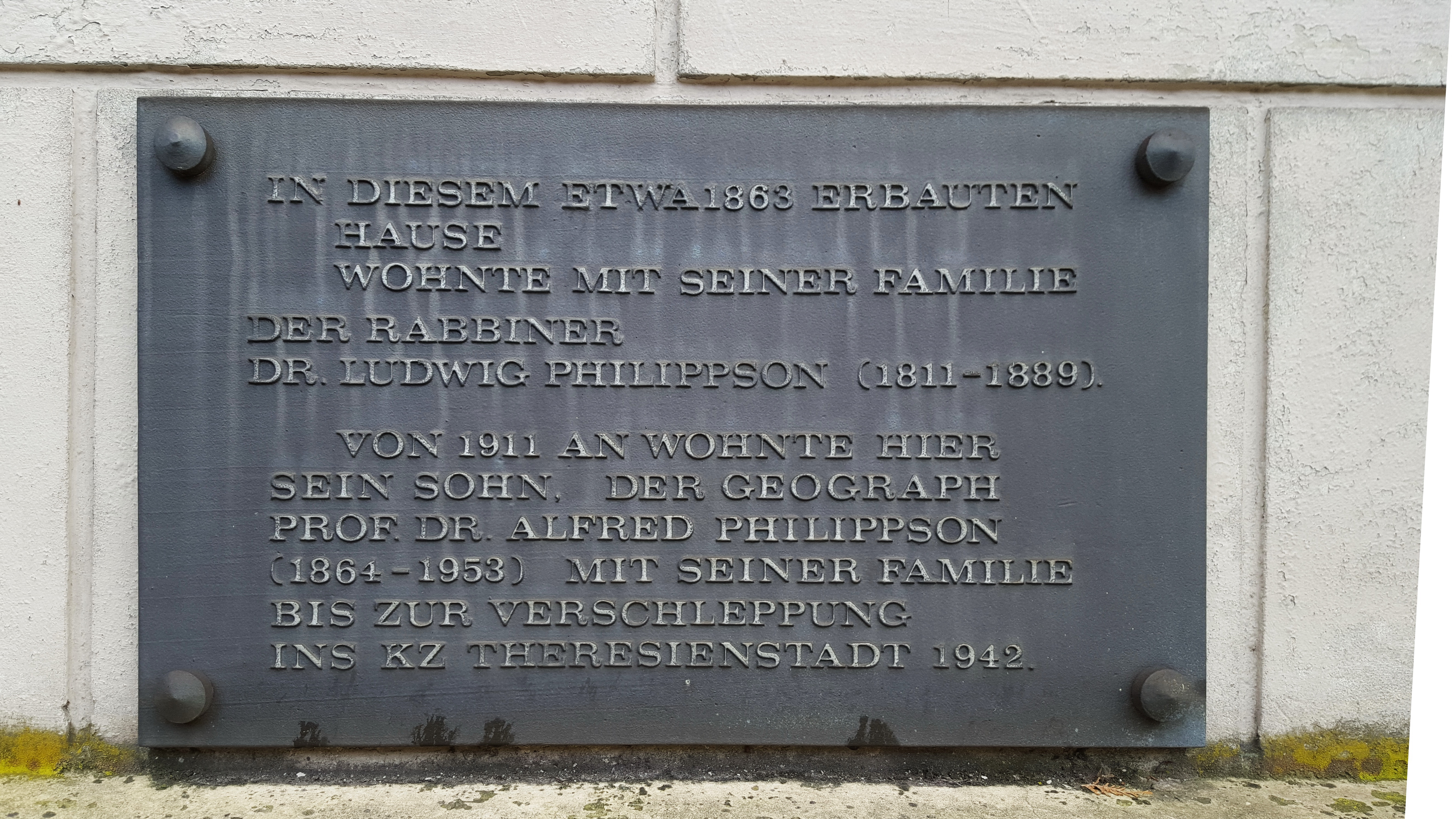 Denkmalgeschütztes Wohnhaus, Königstraße 1, Bonn-Südstadt: Informationstafel